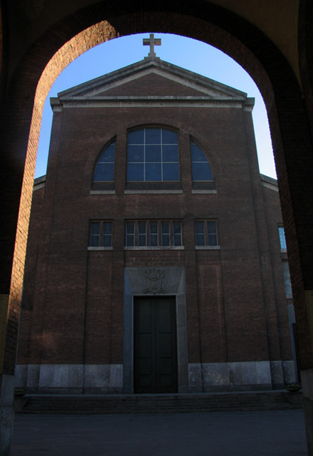 Basilica dei SS. MM. Nereo e Achilleo - Milano